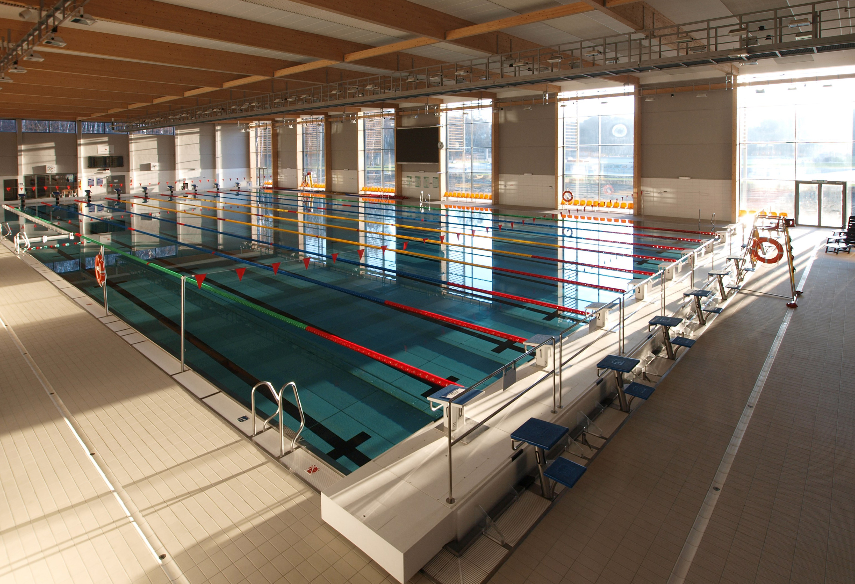 Kryta pływalnia "Olimpijczyk" w Gliwicach. Hala basenowa.